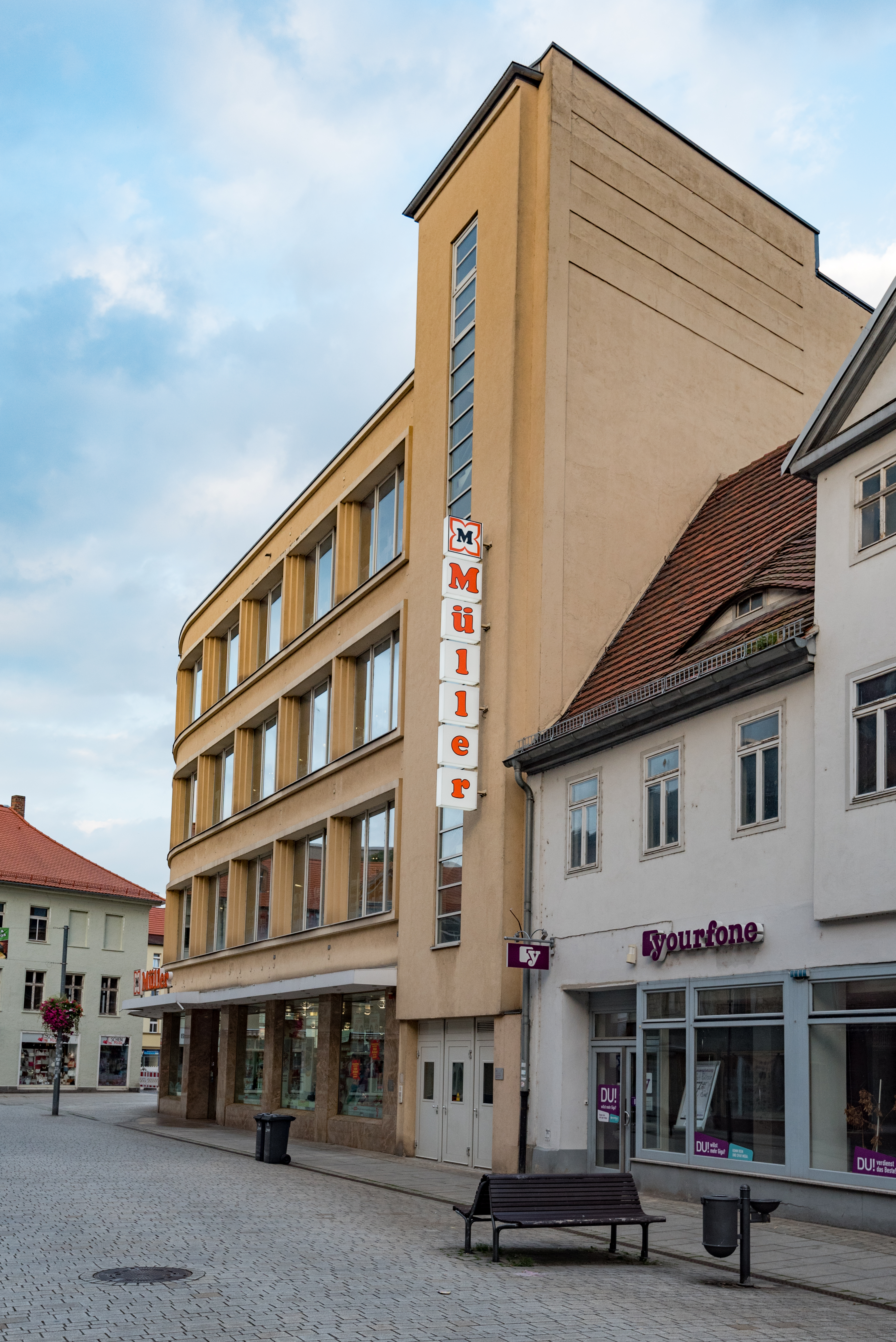 Weißenfels, Jüdenstraße 2